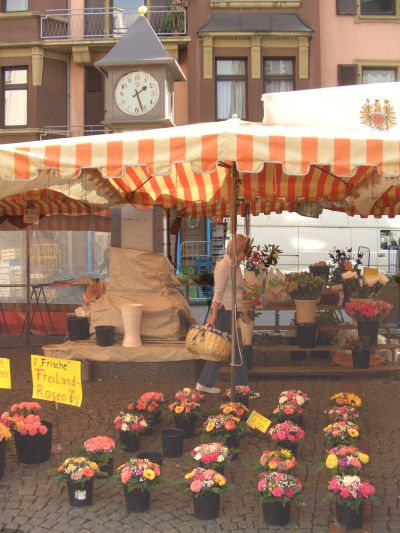 Blumenstand auf dem Bornheimer Wochenmarkt "am Uhrtürmchen" in Frankfurt am Main. Selbst fotografiert am 20. September 2006.